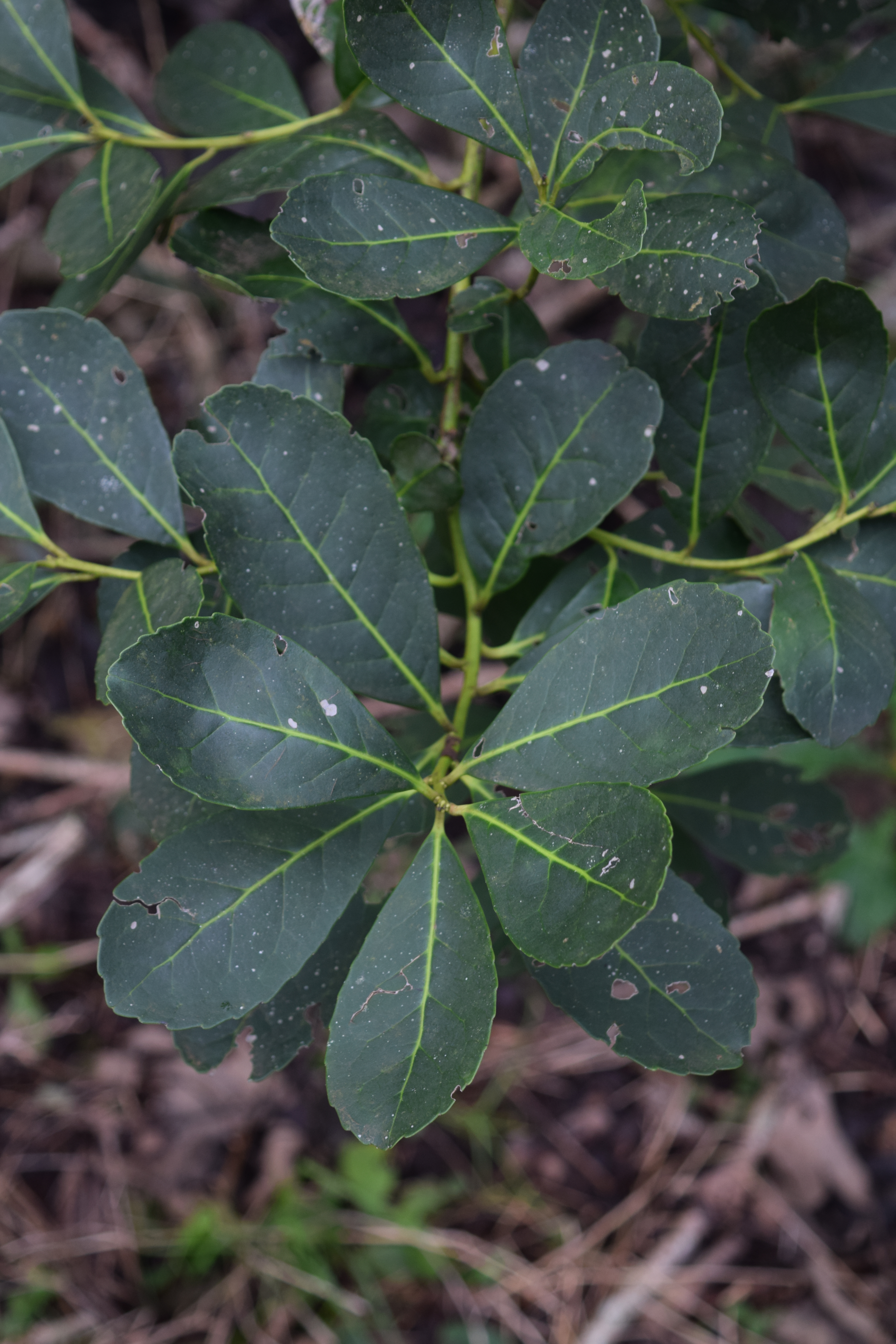 Hojas de Yerba Mate en un campo de la localidad de Campo Ramón, Misiones, Argentina.